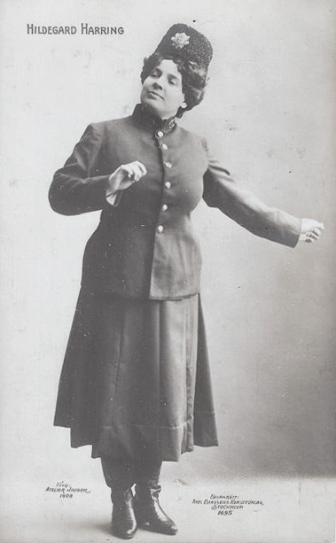 Hildegard Harring